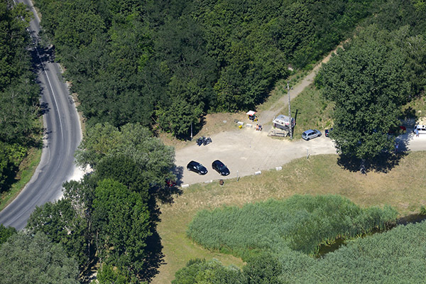 Tinye, Garancsi-tó. Az Üvegtigris forgatási helyszíne légifotón